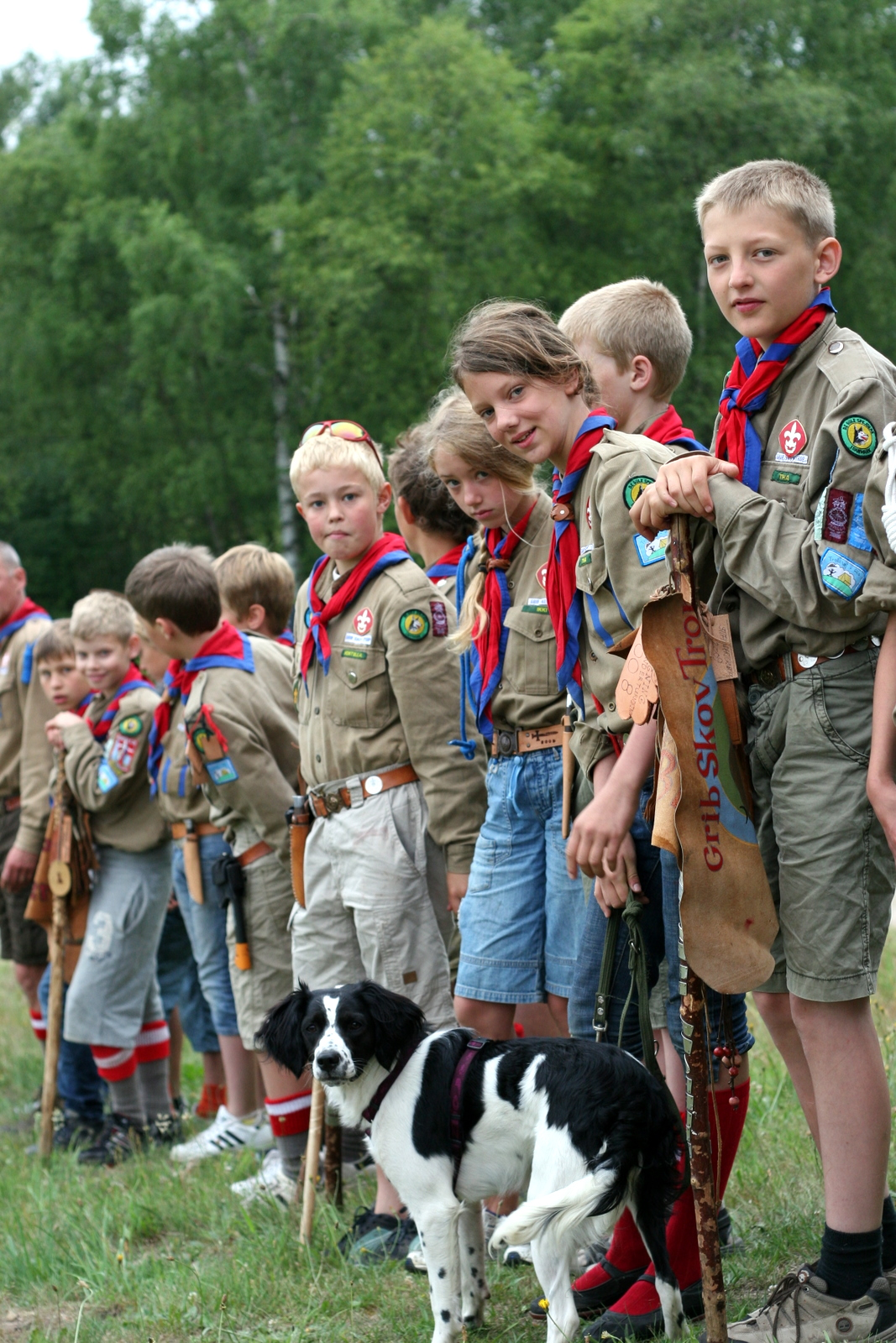 Gule spejdere, Grip skov trop, Stifindere foto Jim Michael Daae